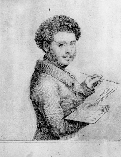 Autoritratto, matita su carta, 19 x 15 cm., Pinacoteca comunale Raffaele Fidanza, Matelica